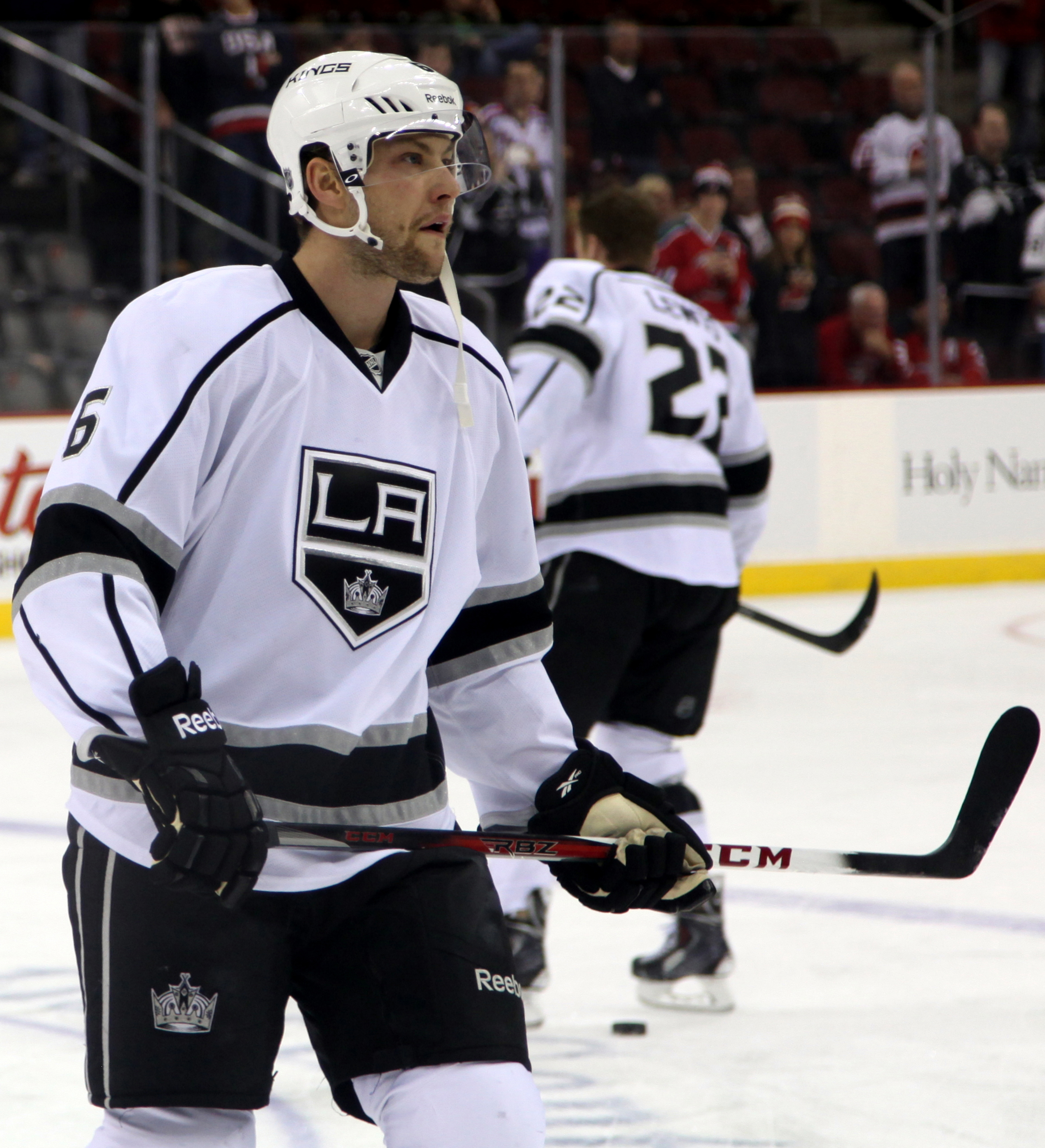 Muzzin in 2013.